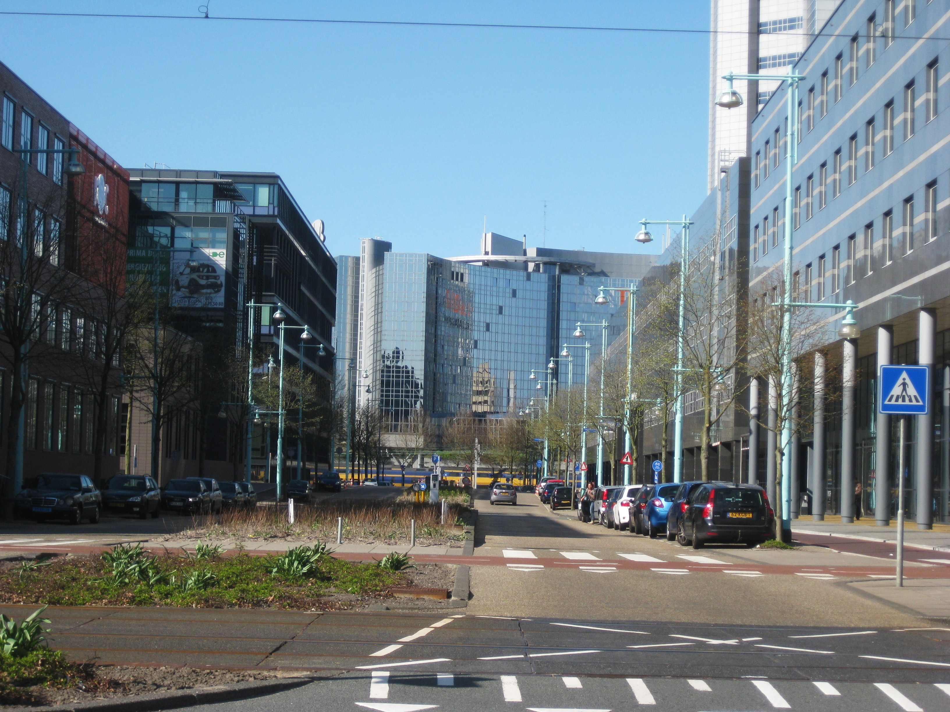 Kingsfordweg in Amsterdam-Westpoort